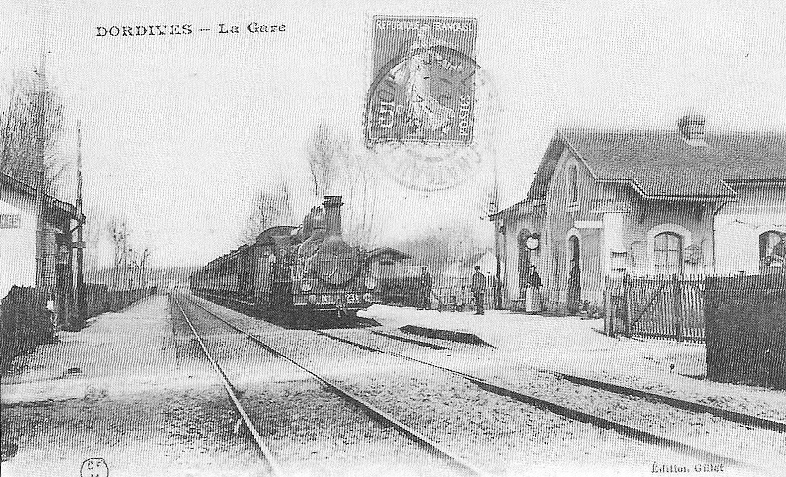 La gare de Dordives (Loiret, France), au début du XX° siècle. Locomotive numéro 231